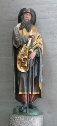 Pfarrkirche St. Jakobus, Brochenzell, Gemeinde Meckenbeuren, Bodenseekreis Figur „Hl. Jakobus der Große“, Anfang 16. Jh.